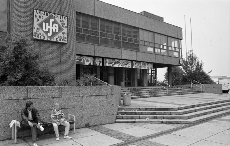 11.-18.8.1991 Bundesland Sachsen-Anhalt Halle-Neustadt Kino